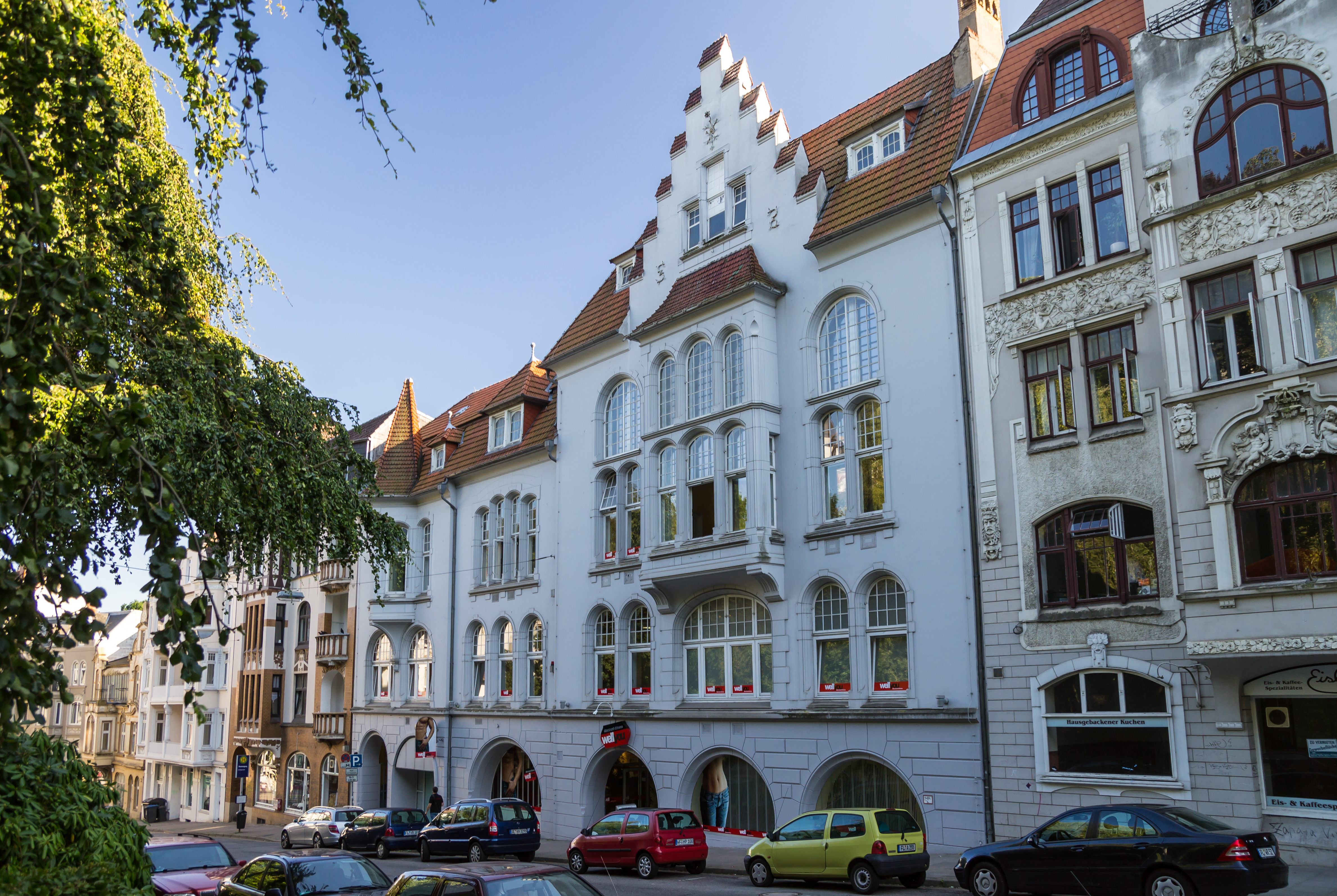 Flensburg-Neustadt, Toosbüystrasse 21, Ehem. Gesellschaftshaus der "Neuen Harmonie", Denkmal-Nr. 21. Von ca. 1983 - 2001 befand sich in den oberen Etagen das City-Kino mit vier Vorführräumen. Im Erdgeschoss befand sich eine Filiale von "Kaisers" (Tengelmann), in den 1990ern dann bis ca. 2003 eine "Plus" Filiale. Zum Zeitpunkt der Aufnahme befindet sich im EG ein Fitnessstudio der Kette "Wellyou".